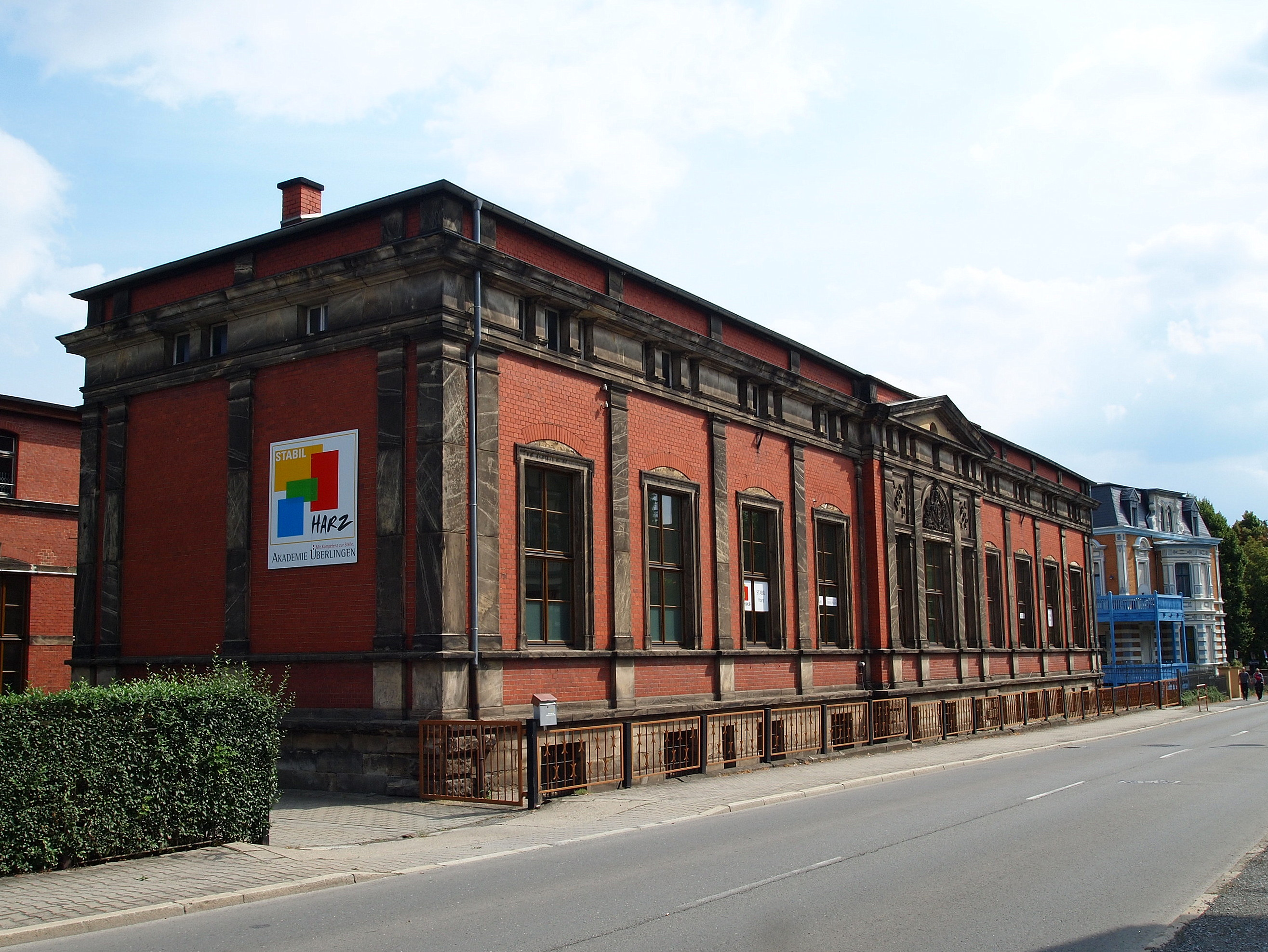 Blankenburg am Harz, Sachsen-Anhalt; Kuno-Rieke-Straße 9-11, Domizil von "STABIL Harz" (Projekt der Akademie Überlingen)